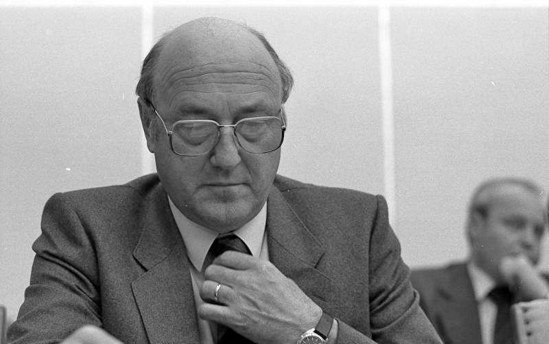 Bundesratssitzung Themen: Bundeshaushalt 1981, Sozialversicherungsgesetz für Kunstschaffende